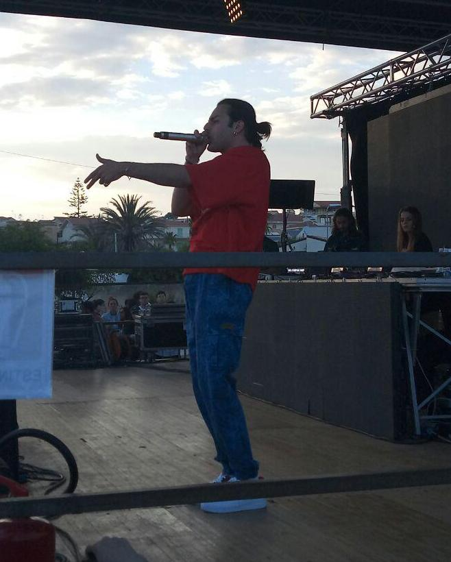 Il rapper italiano Ernia in concerto nel 2019